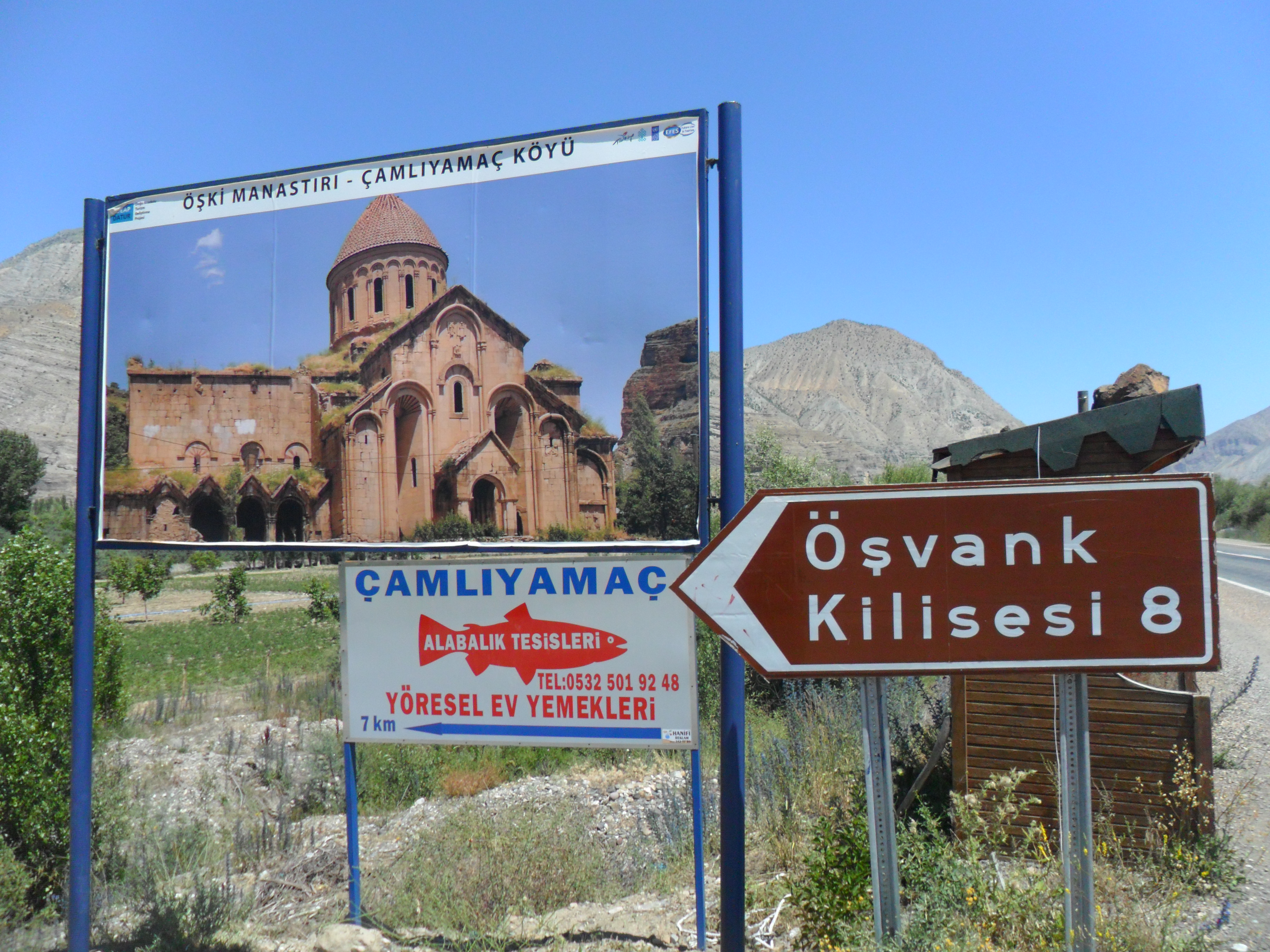 Էրզրում - Արդվին ճանապարհ